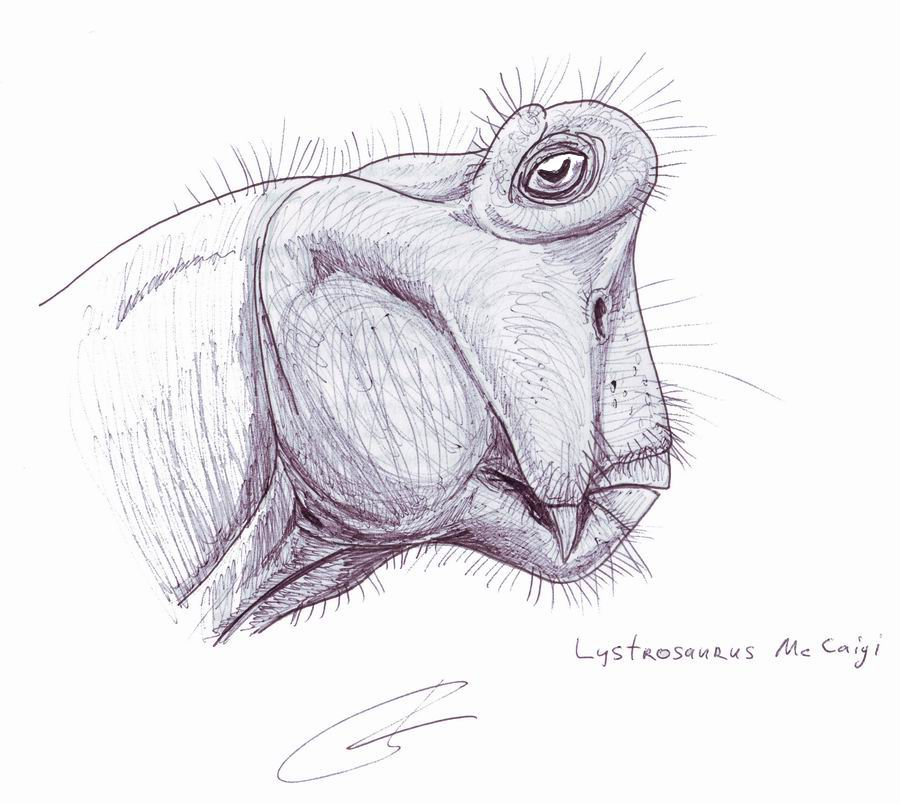 Lystrosaurus mccaigi Seeley, 1898